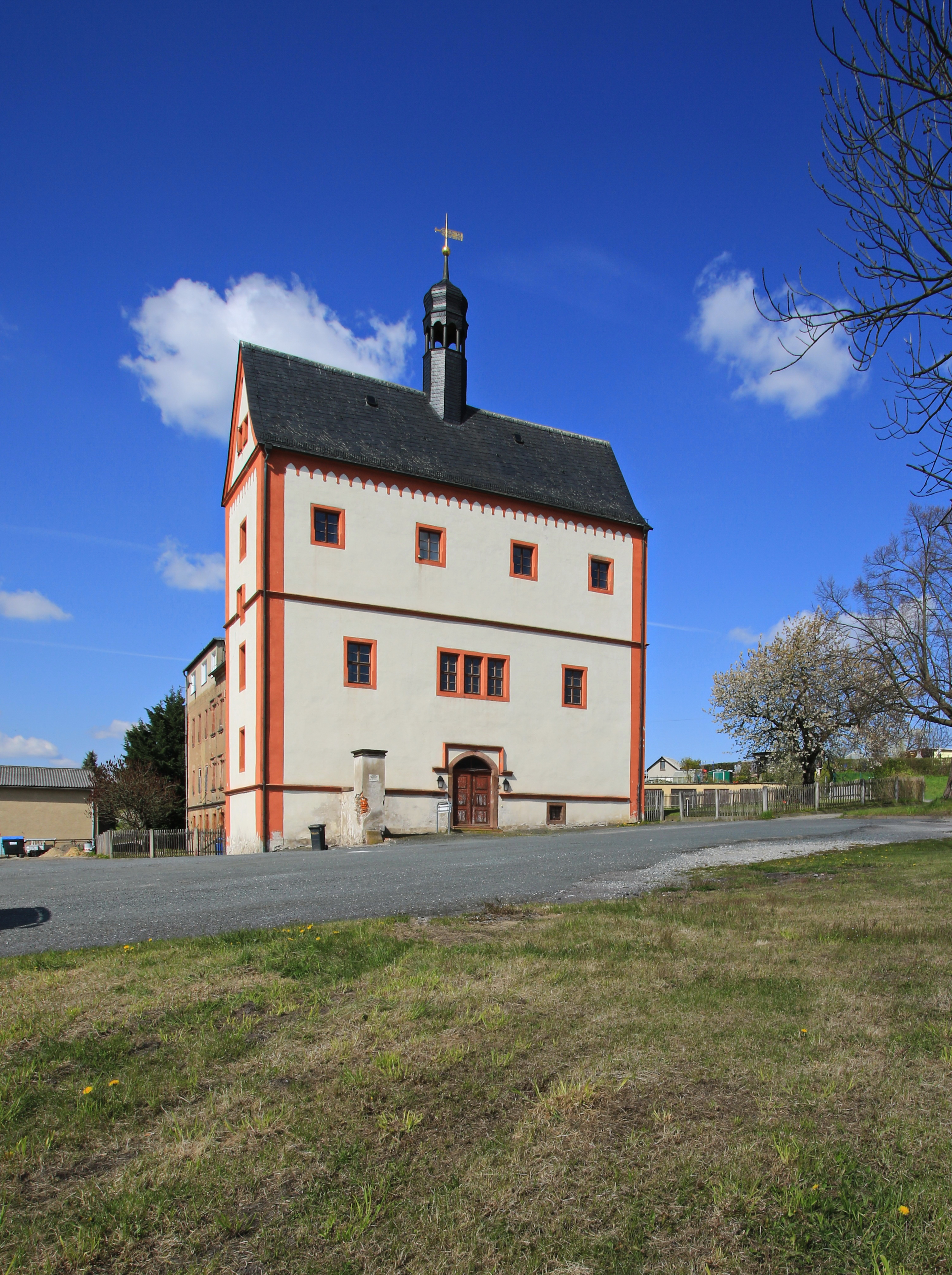 Das Kloster Remse in Sachsen.